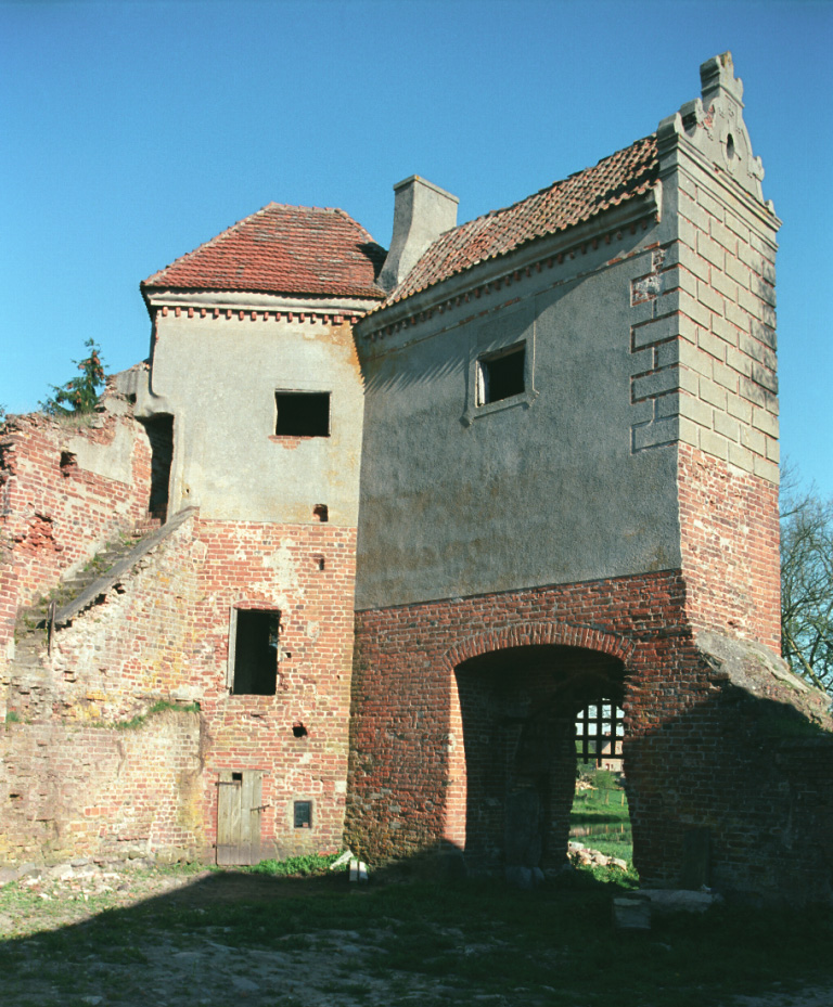 Zamek Kiszewski - budynek bramny, XIV, XVII (widok od dziedzińca)